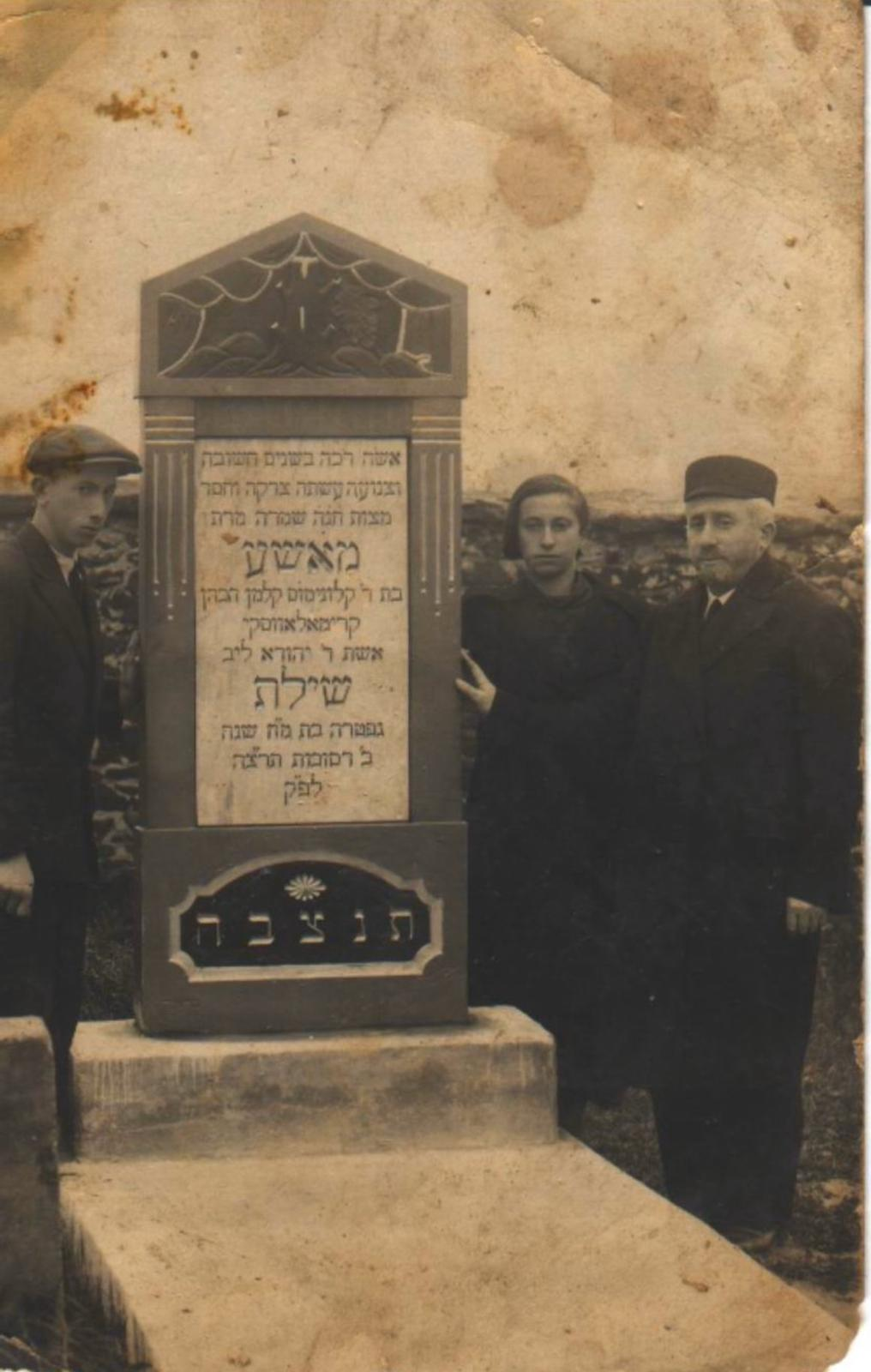 יהודים עולים לקבר להיפרד מקרוביהם לפני העלייה לארץ ישראל בבית העלמין היהודי בפראשקה, פולין, 1922